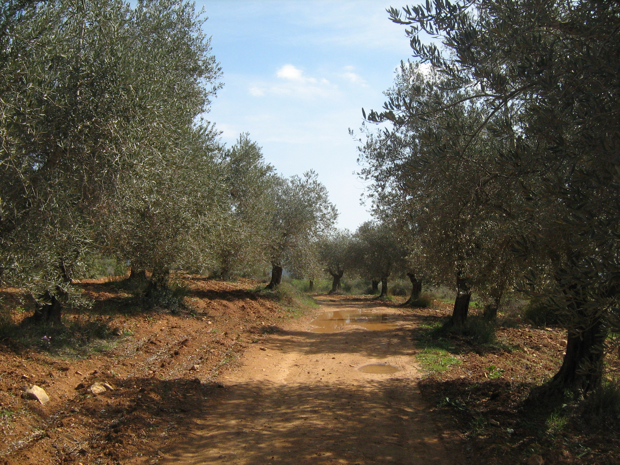 מראה בהר חרת